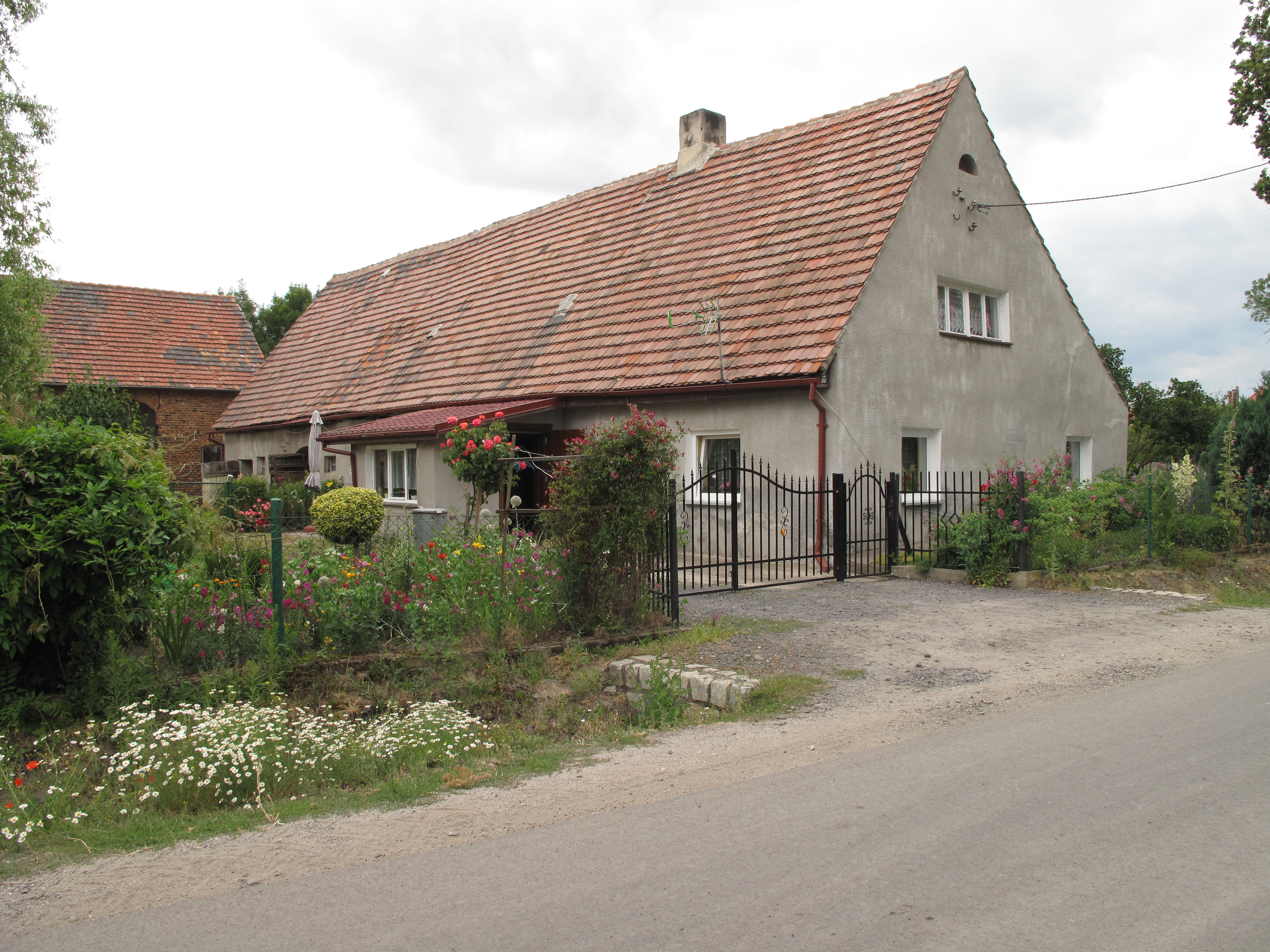 Dłużyna Dolna. Polska